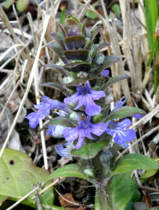 Ajuga reptans